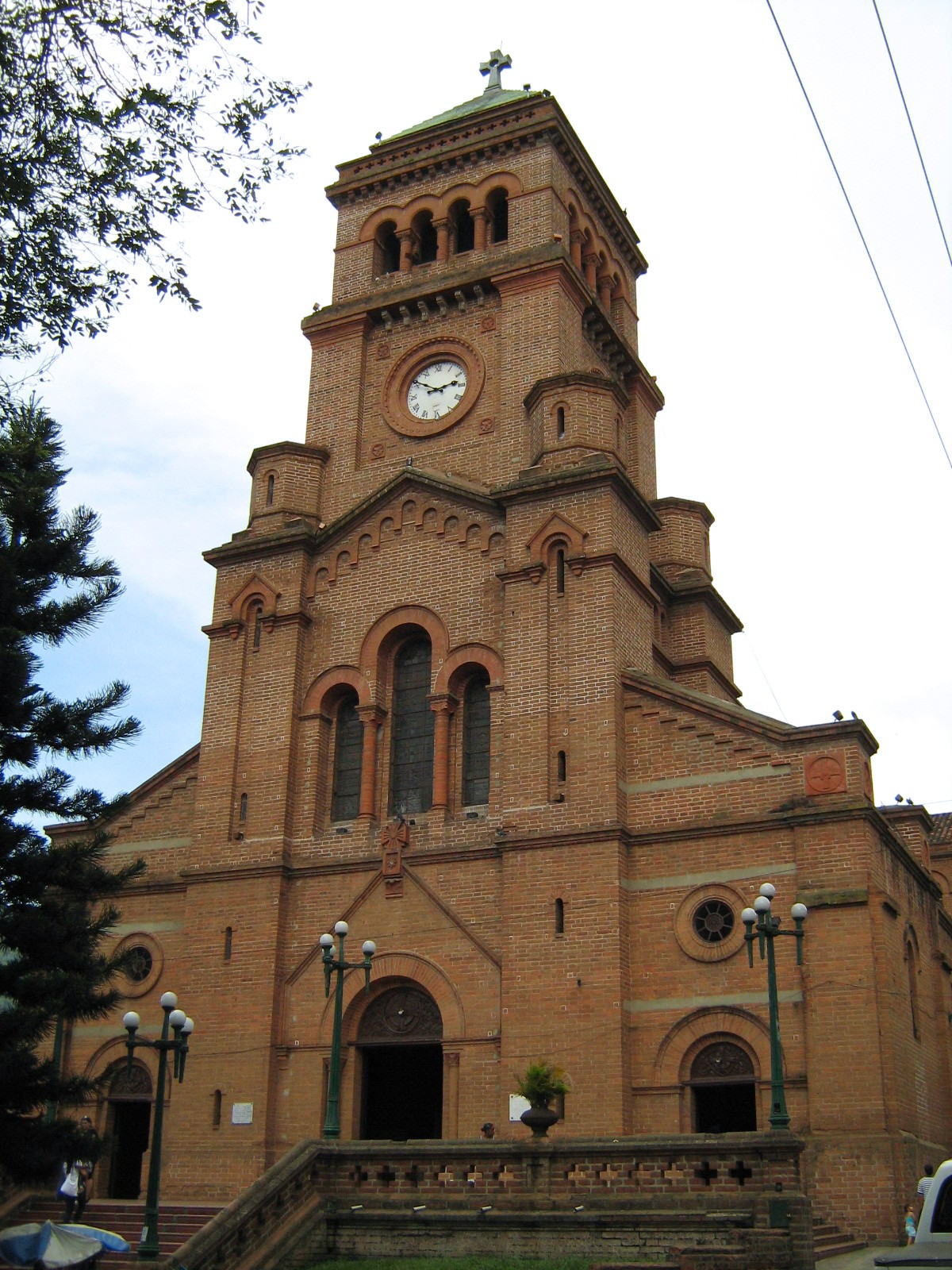 Fachada Principal de la Catedral de Girardota, Antioquia, Colombia.